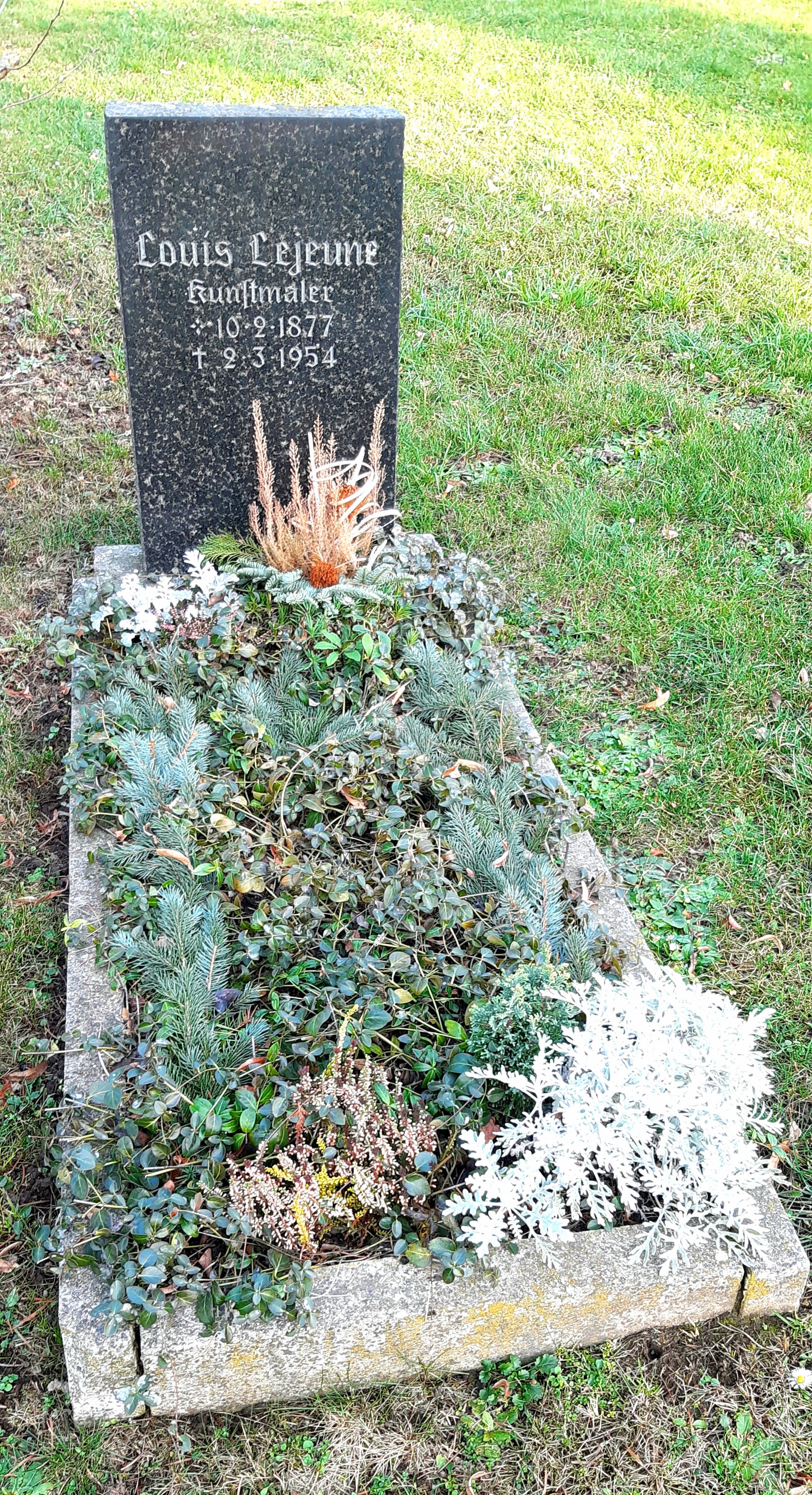 Grab von Louis Lejeune auf dem Friedhof in Niederlungwitz, Glauchau, Sachsen (DE)